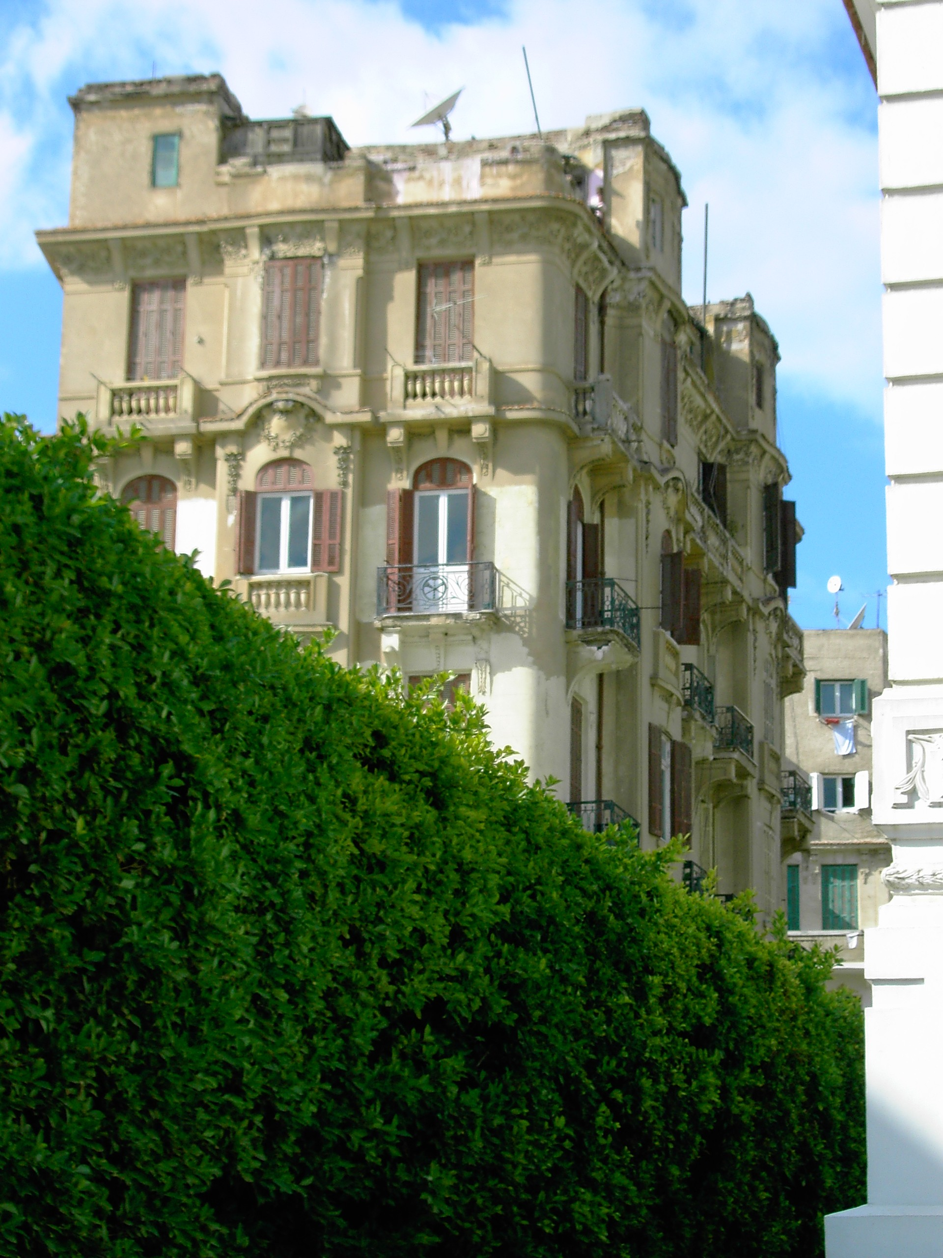 photo personnelle d'Alexandrie